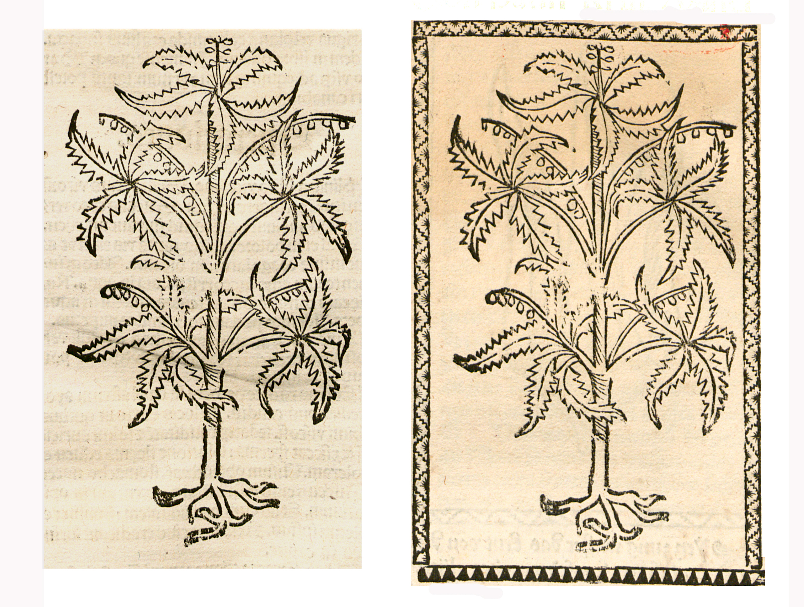 Abbildung von: Hanff krut (Cannabis sativa)